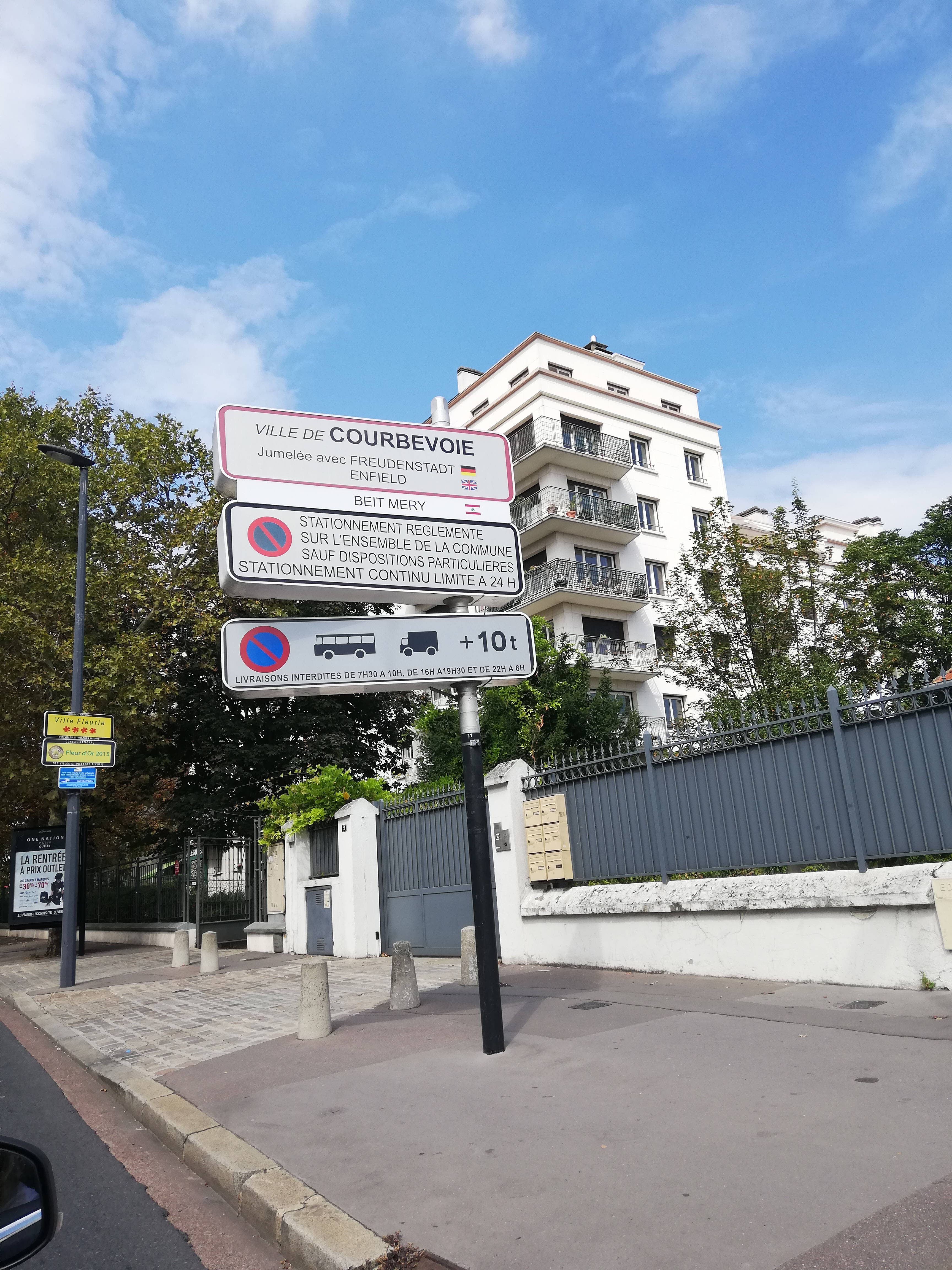 Panneau indiquant les villes jumelées à celle de Courbevoie, France.